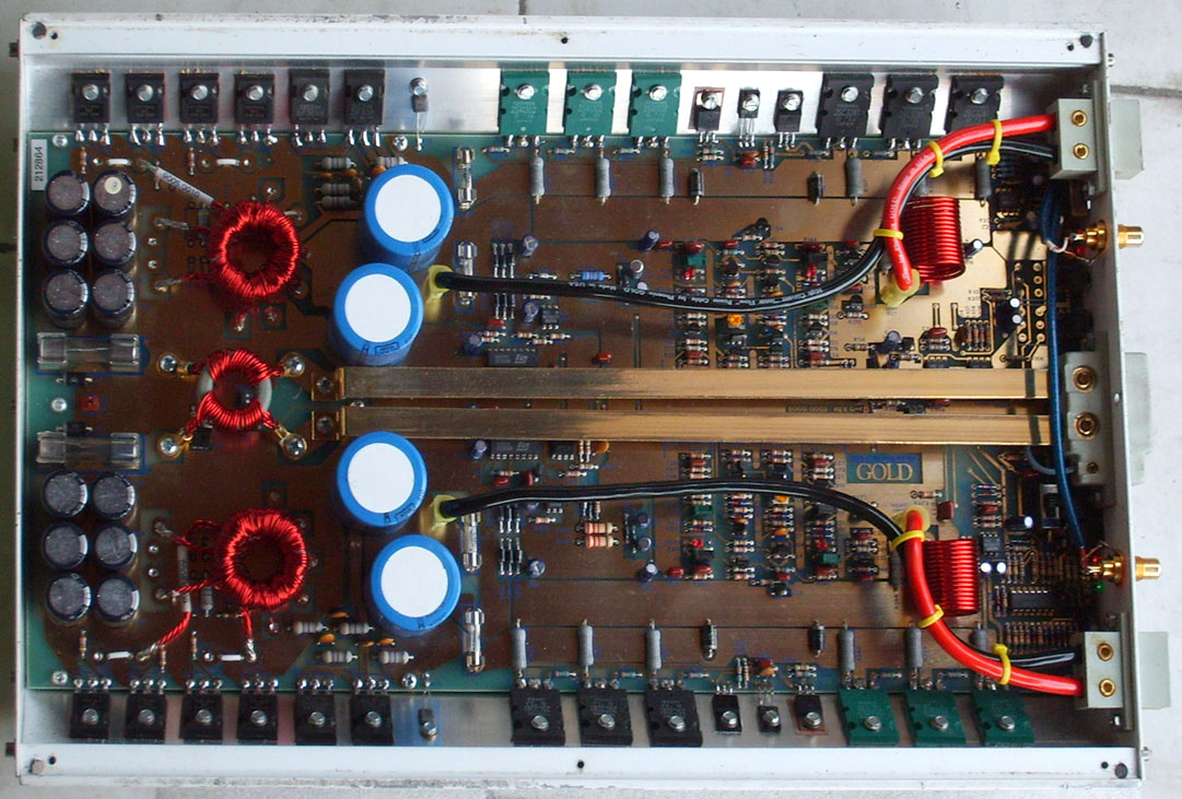 Amplificatore per Auto Phoenix gold ms 2125 lato componenti